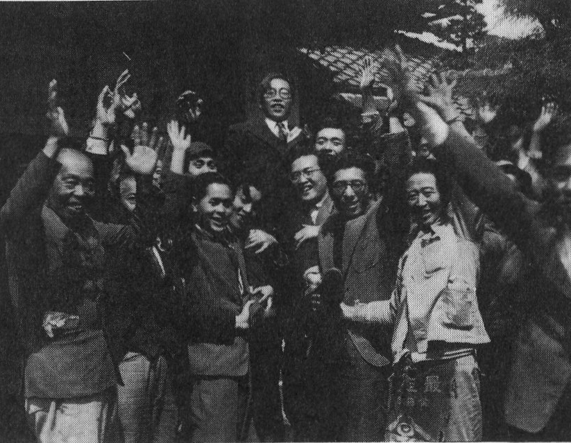 滋賀県議会に初当選した宇野宗佑